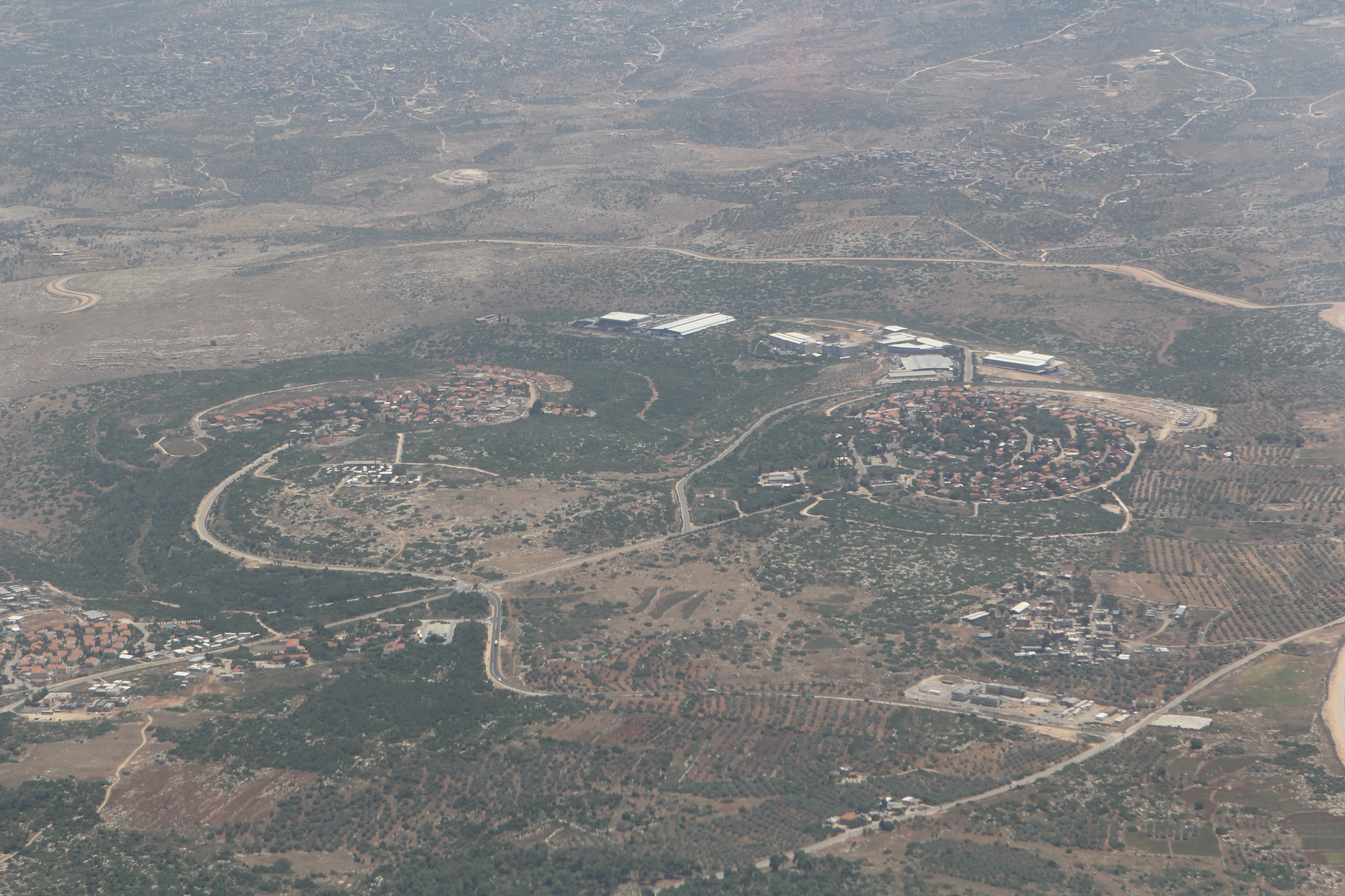 צילום אוויר של שקד, חיננית, טל מנשה